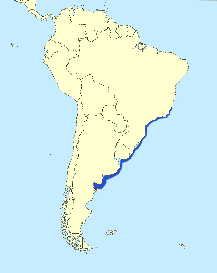 Ареал Rioraja agassizii